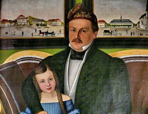 Der Glashüttenherr Wilhelm Steigerwald mit Tochter Louise, im Hintergrund Haida (Nový Bor)